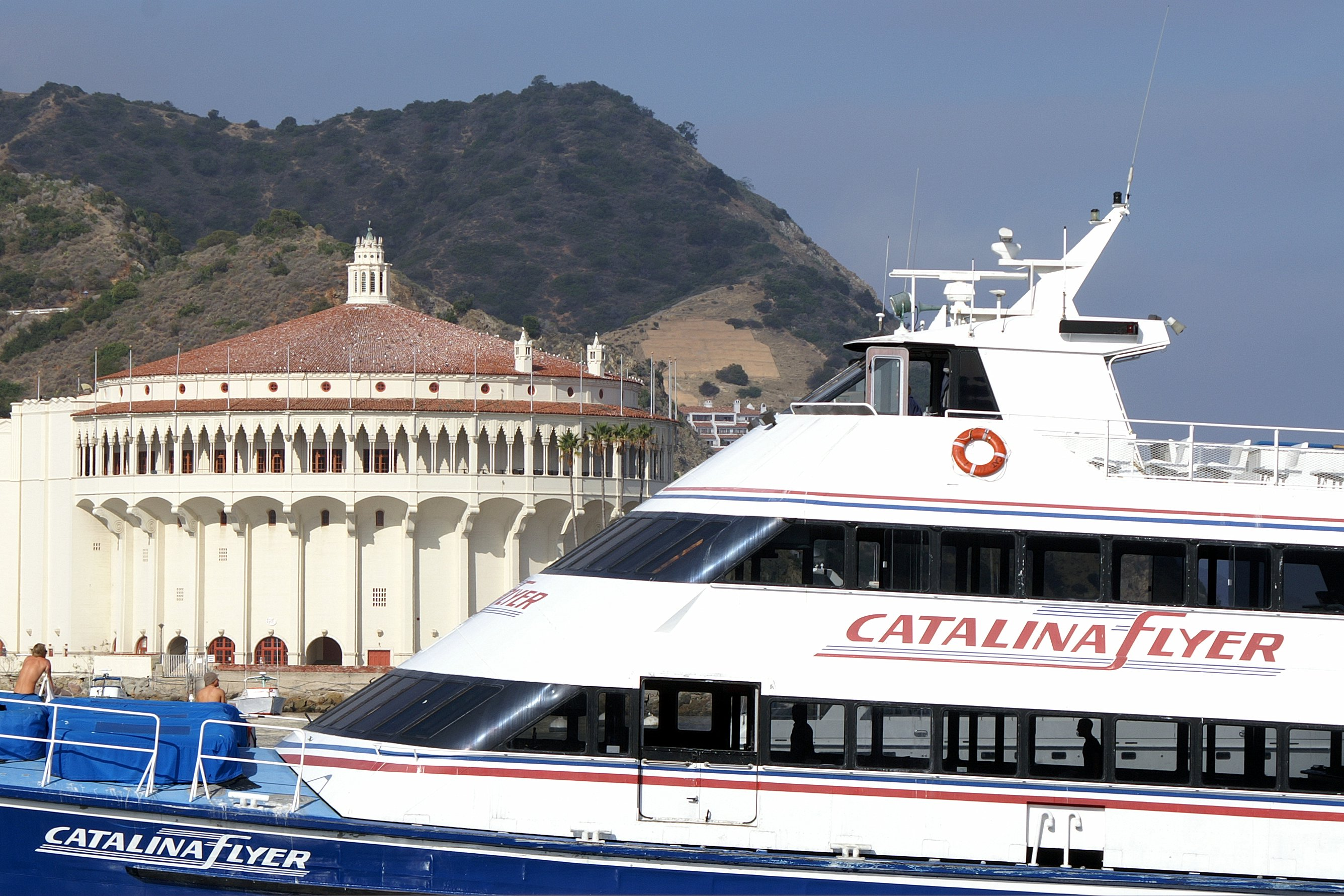 Catalina Flyer and Catalina Casino.